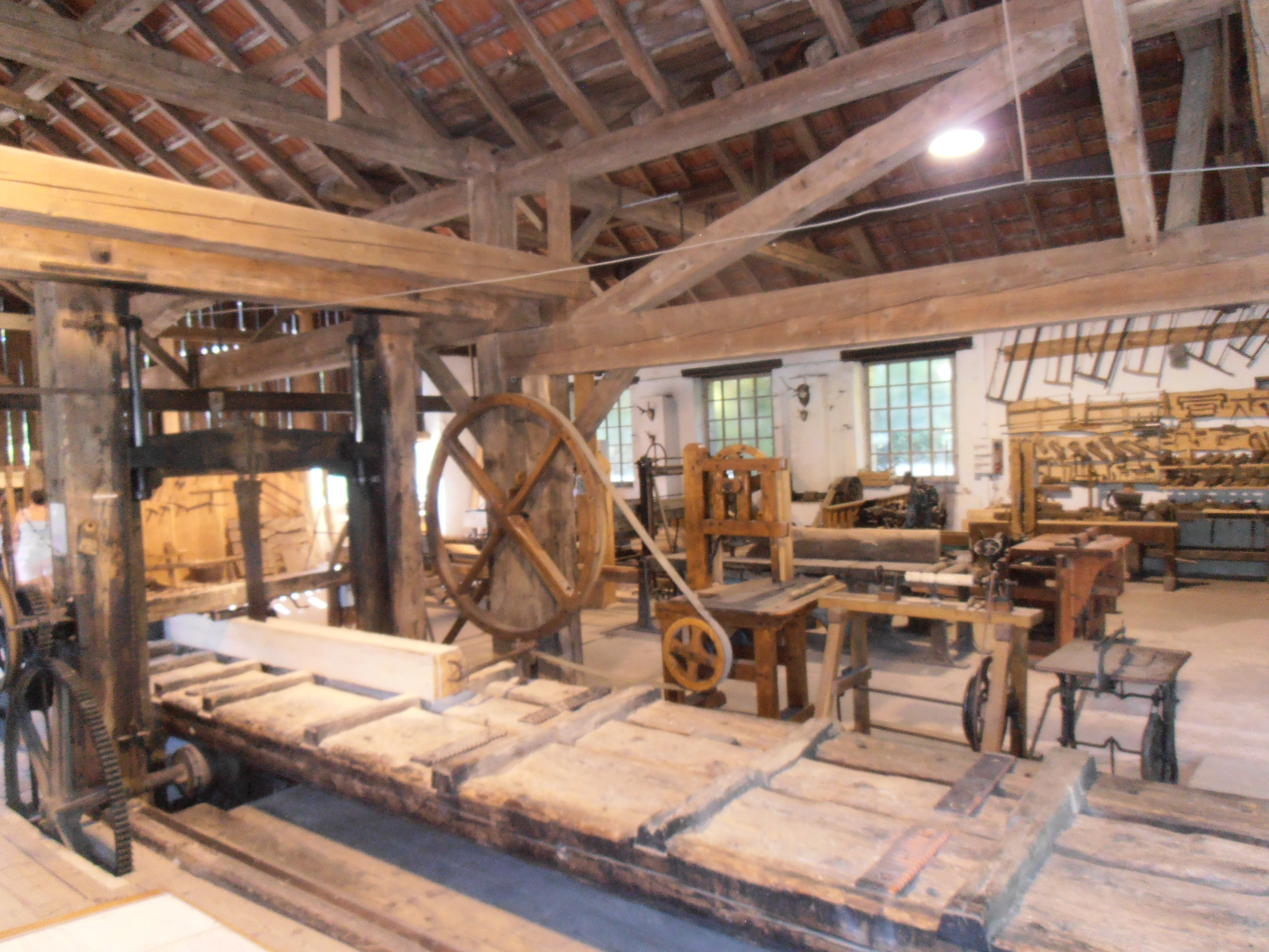 Vosges, Saulxures-sur-Moselotte. Le Musée du Bois, présenté dans l’ancienne « scierie Haut Fer du Rupt de Bâmont » conservée en « Maison de la forêt et du bois des Vosges », avec ses installations centenaires encore en place, dont le célèbre haut fer vosgien, et roue à augets de 4 m 20 de diamètre en fonctionnement, ainsi qu’une collection d'outils anciens illustrant les métiers du bois de la montagne vosgienne.